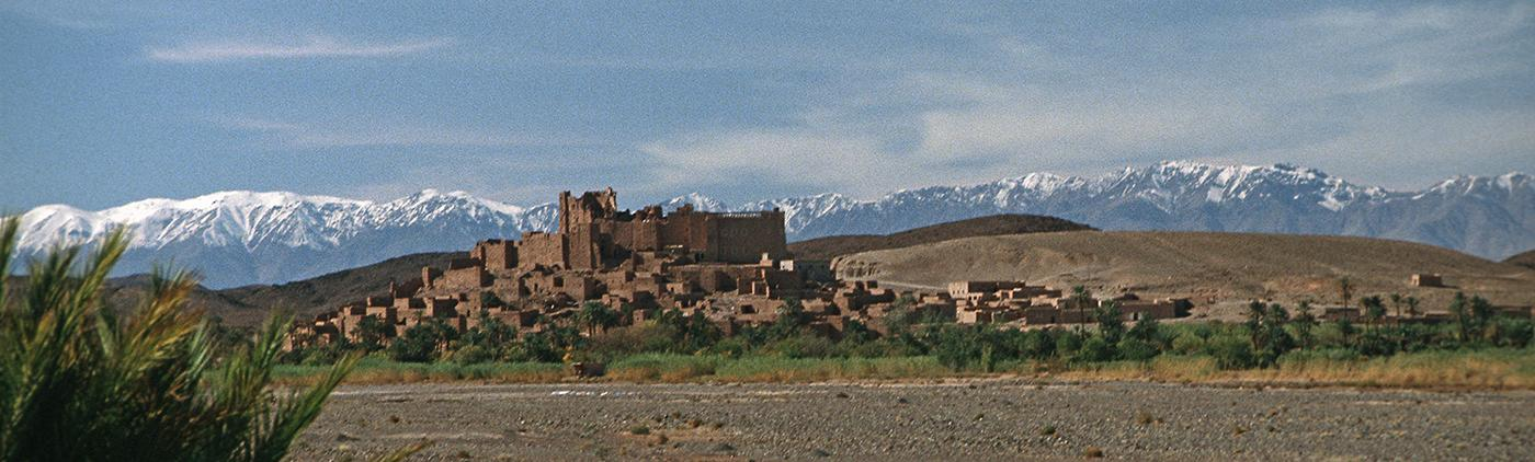 Hoher Atlas, Dades-Tal